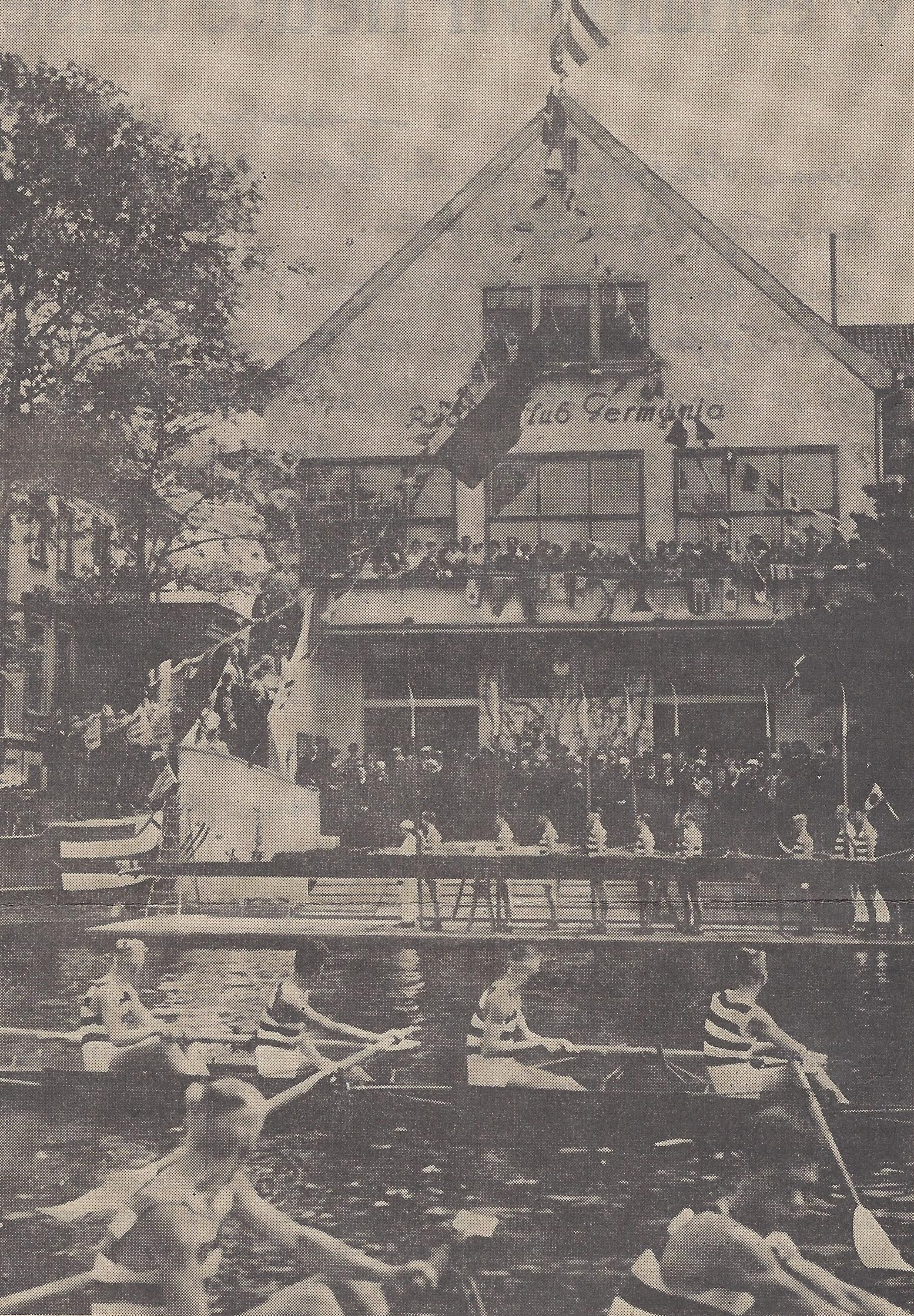 Bootshaus des Ruderclubs Germania Königsberg; Weidendamm 21, Königsberg. Links Corpshaus der Masovia.